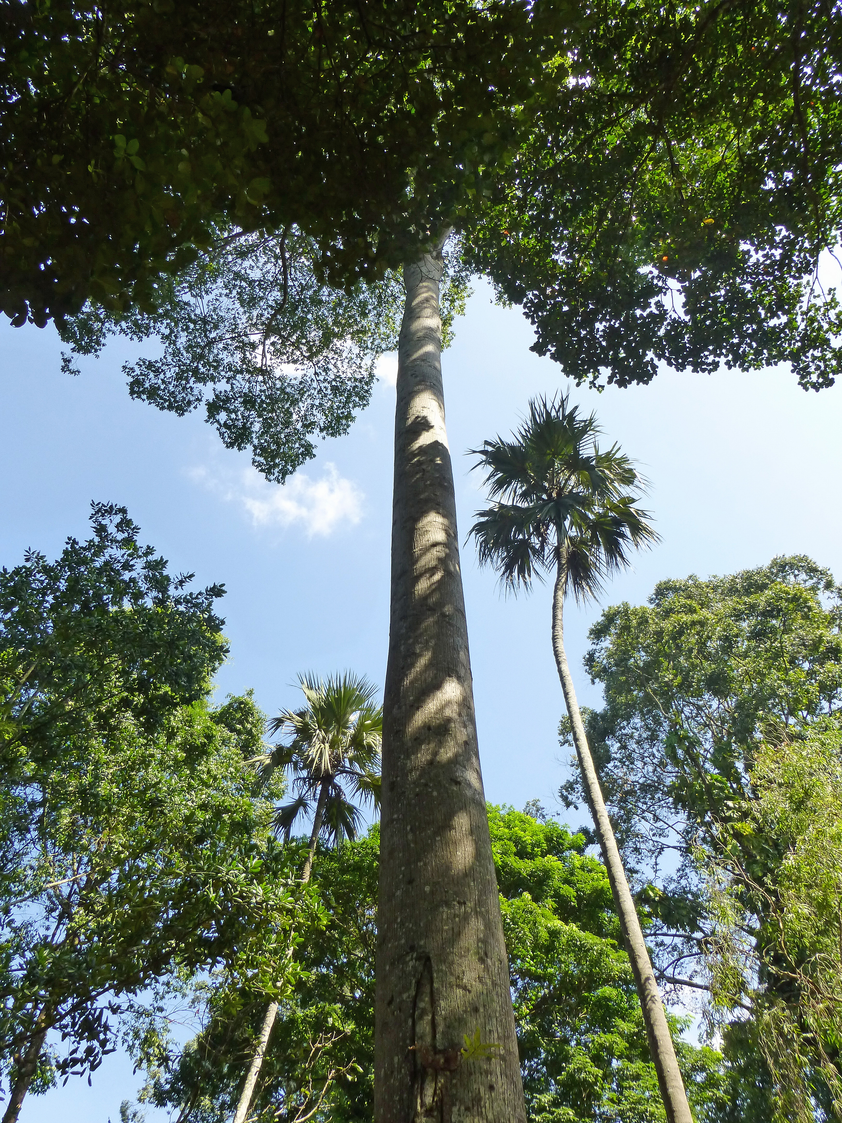 Upas tree (Antiaris toxicaria) au Jardin botanique de Kandy (Sri Lanka). Origine : Sri Lanka, Moluques.